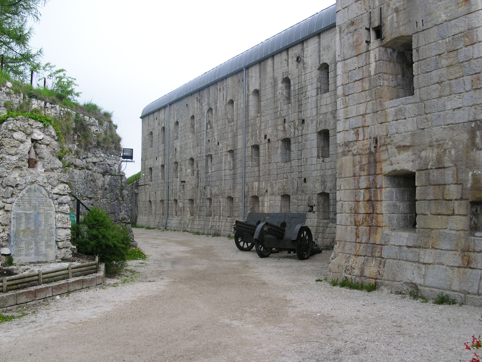 Forte Belvedere-Gschwendt